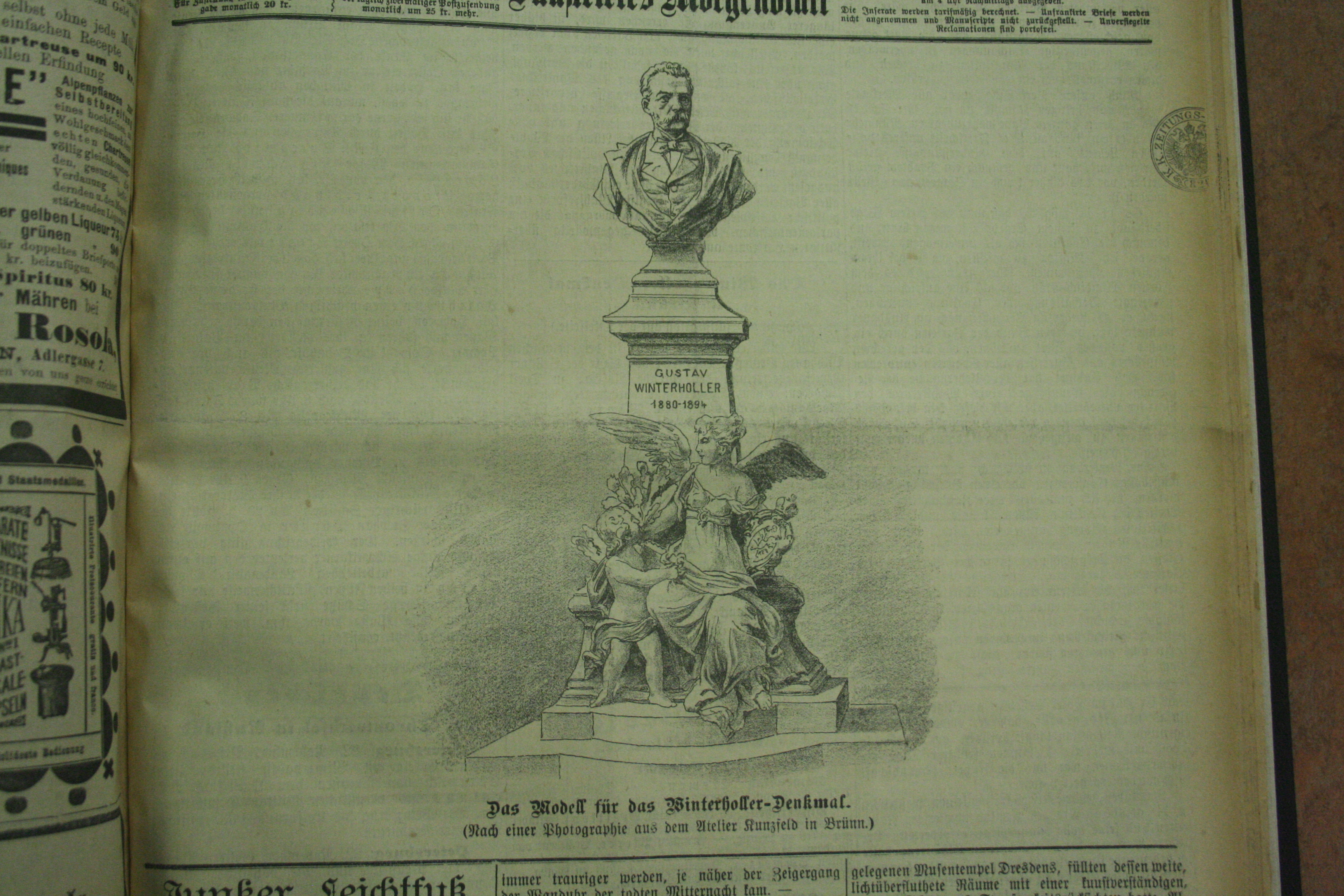 Entwurf des Winterholler-Denkmals